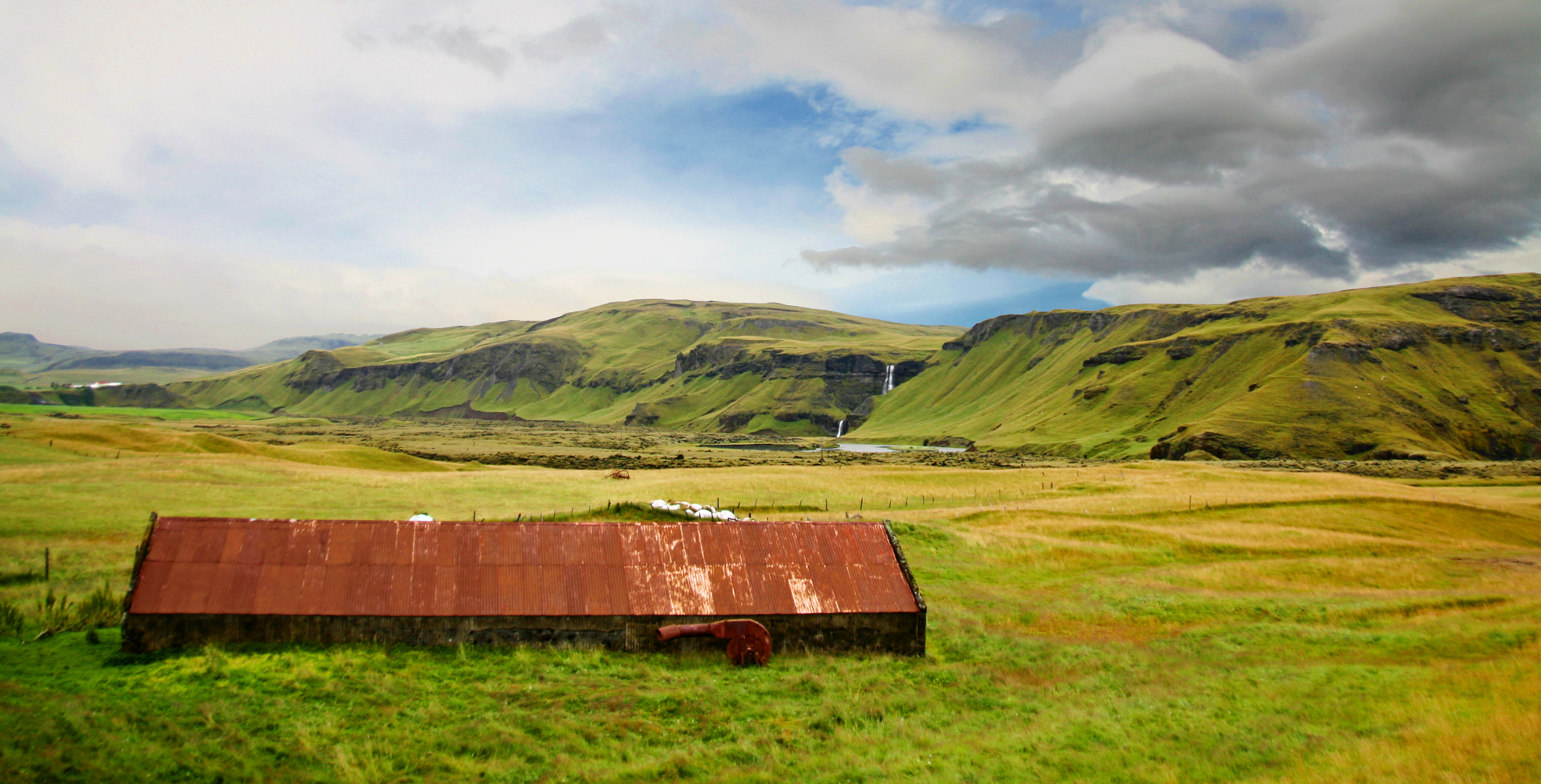 House in Iceland (Kirkjubæjarklaustur)